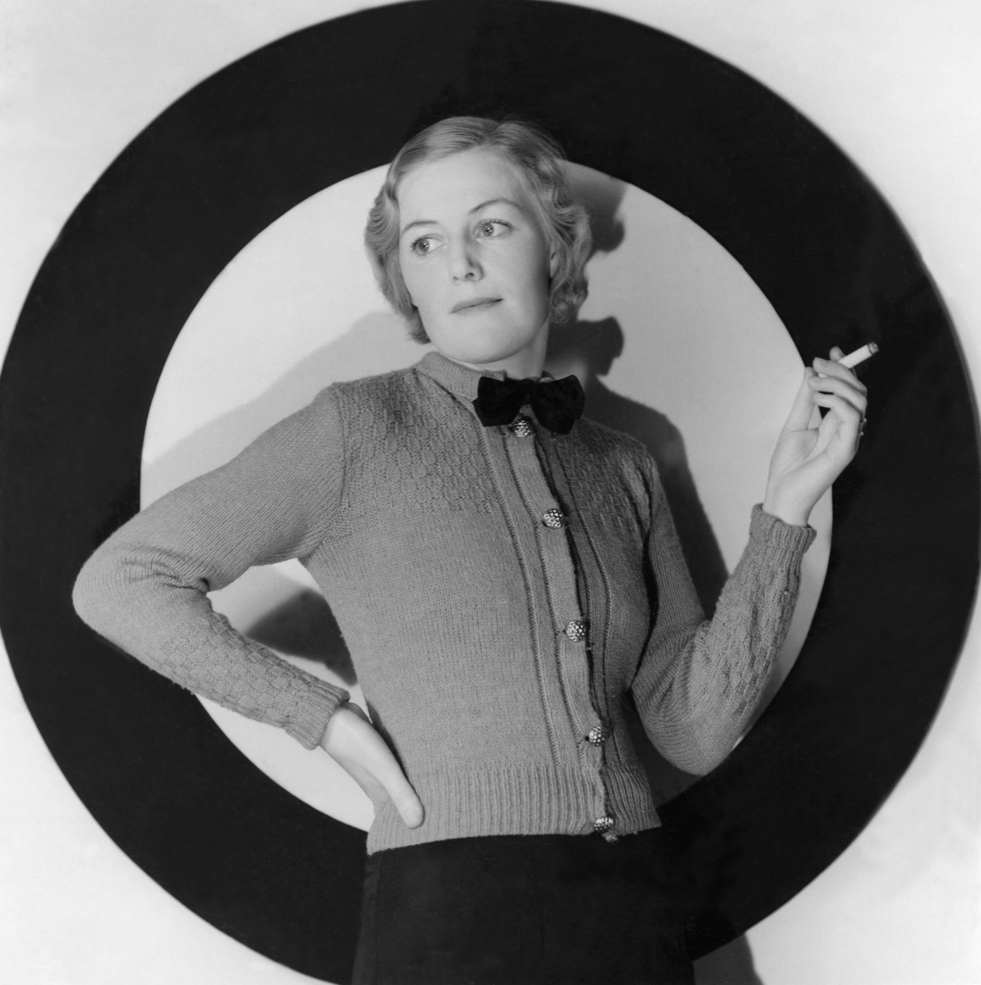 Nordiska Kompaniet visar dammode. Modell klädd i stickad kofta med rosett i halsen. I handen håller hon en cigarrett. Ämnesord: Kläder, Kvinna, Mode, Tobak.